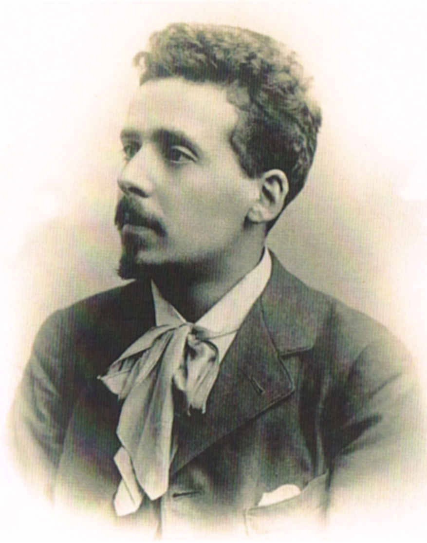 Portrait du peintre belge Richard Heintz (1871-1929)